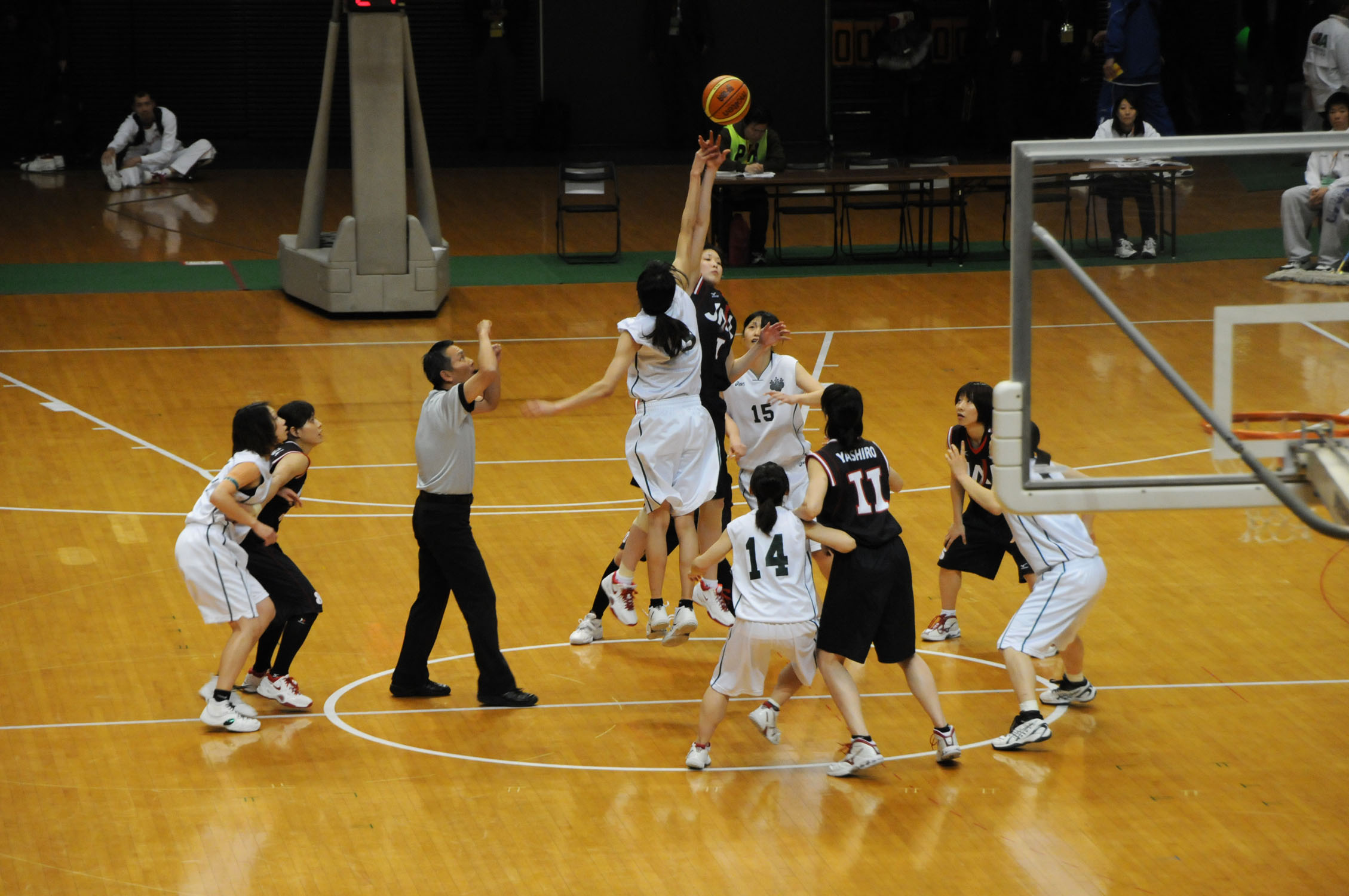 2010年全日本総合バスケットボール選手権大会3回戦、日本航空JALラビッツ対筑波大学。東京体育館で。